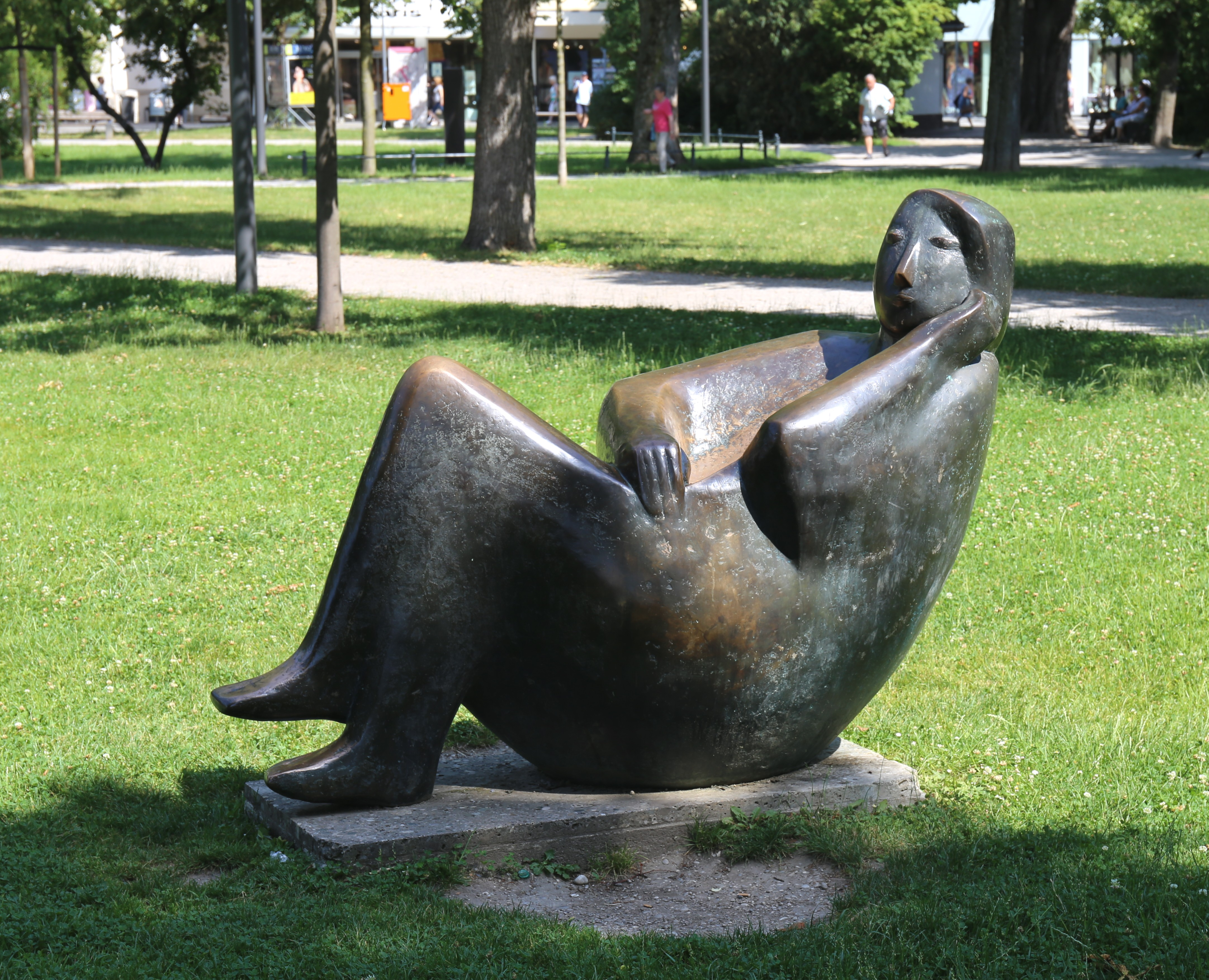 Marianne Lüdicke, Ruhe, 1985, Bronze; Salingarten, Rosenheim Marianne Lüdicke (1919–2012) DescriptionGerman sculptressDate of birth/death 18 October 1919 18 August 2012Location of birth/death Frankfurt am Main MarquartsteinAuthority control : Q54890 VIAF: 30331906 ISNI: 0000 0000 1368 502X GND: 11872956X RKD: 420749 creator QS:P170,Q54890